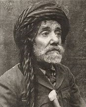 کوردی: شاعیرێکی بەناوبانگی کوردە